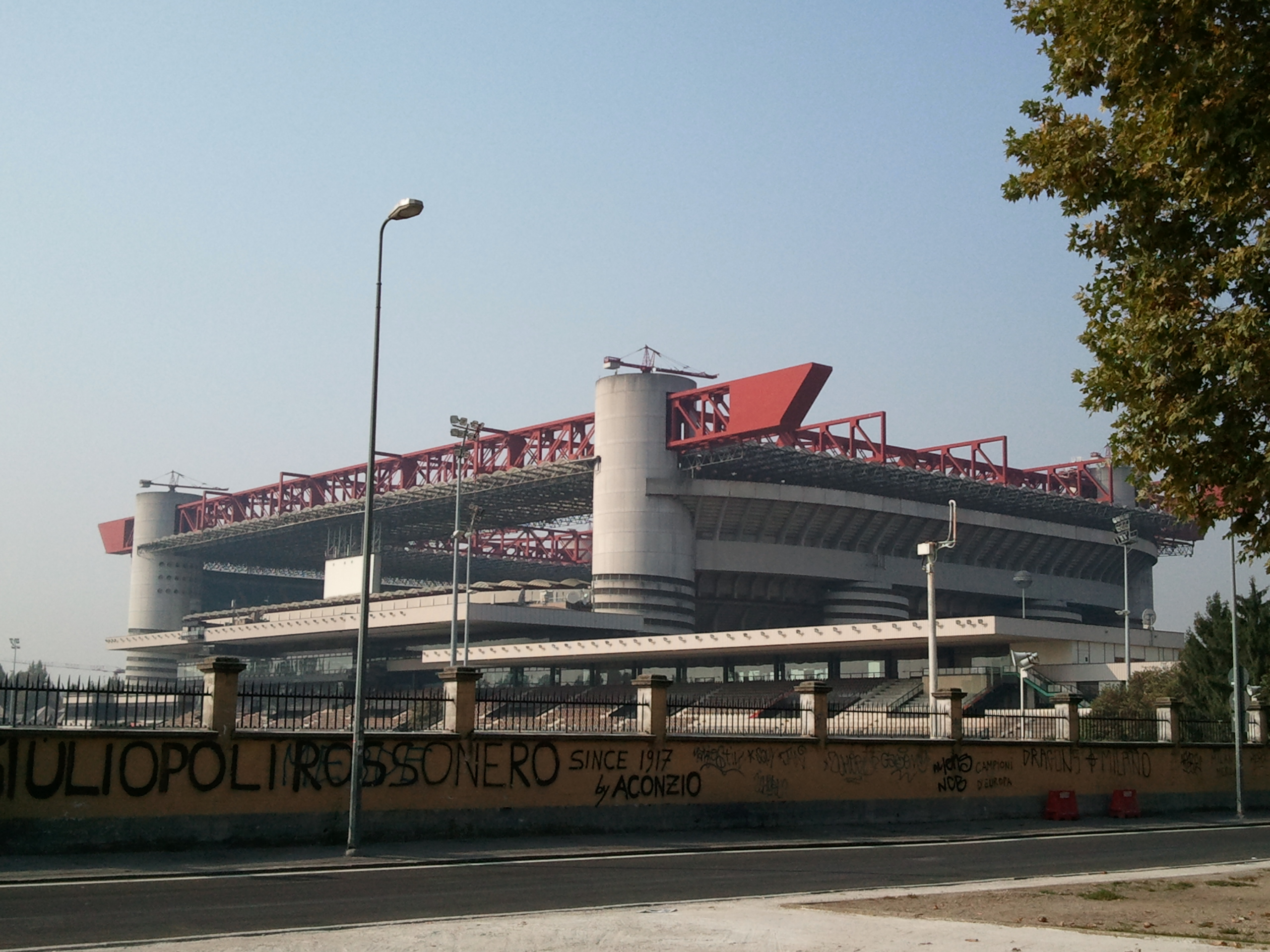 San siro Stadium, Milan, Italy